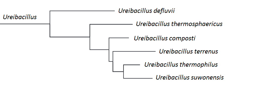 Phylogenetische Systematik der Gattung Ureibacillus Stand: 2014 Quelle: ZHOU, S., TANG, J., QIN, D., LU, Q. and YANG, G. 2014. Ureibacillus defluvii sp. nov., isolated from a thermophilic microbial fuel cell.